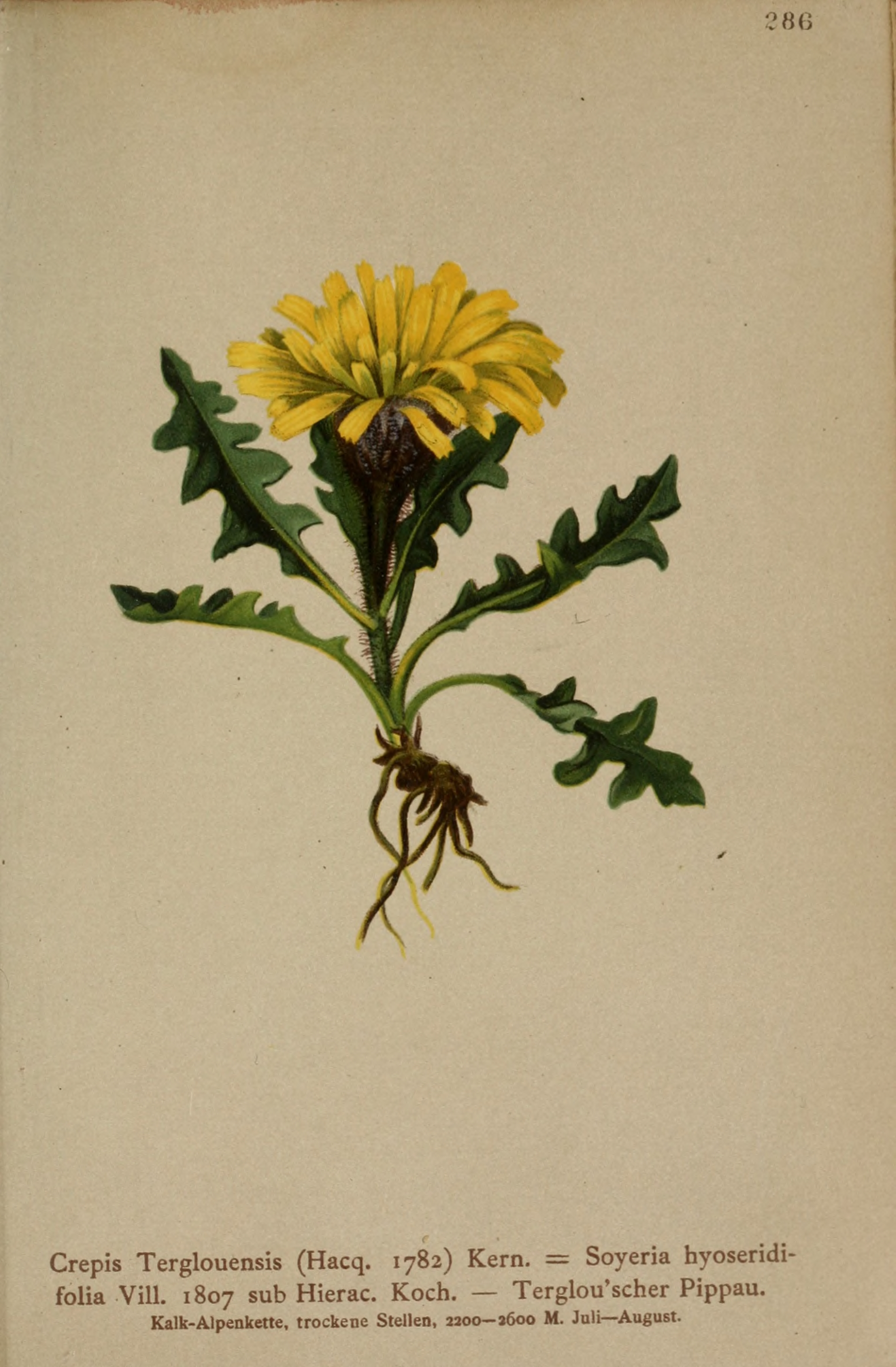 Legende: Ganze Pflanze.